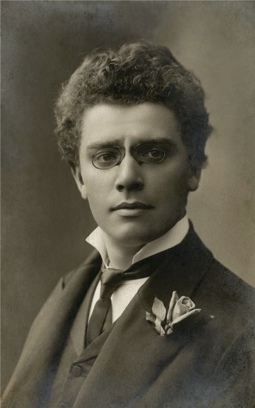 Emil Burian (1876 - 1926), Český operní pěvec.